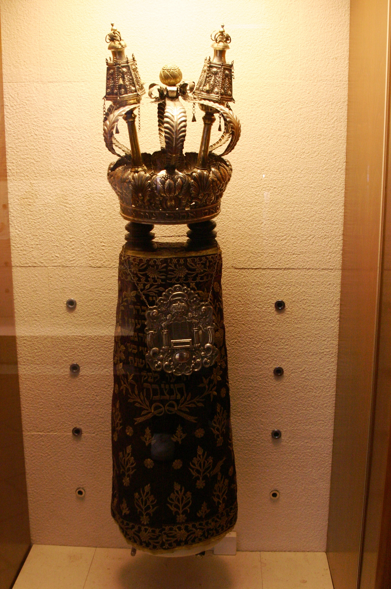 Rolo da Torá